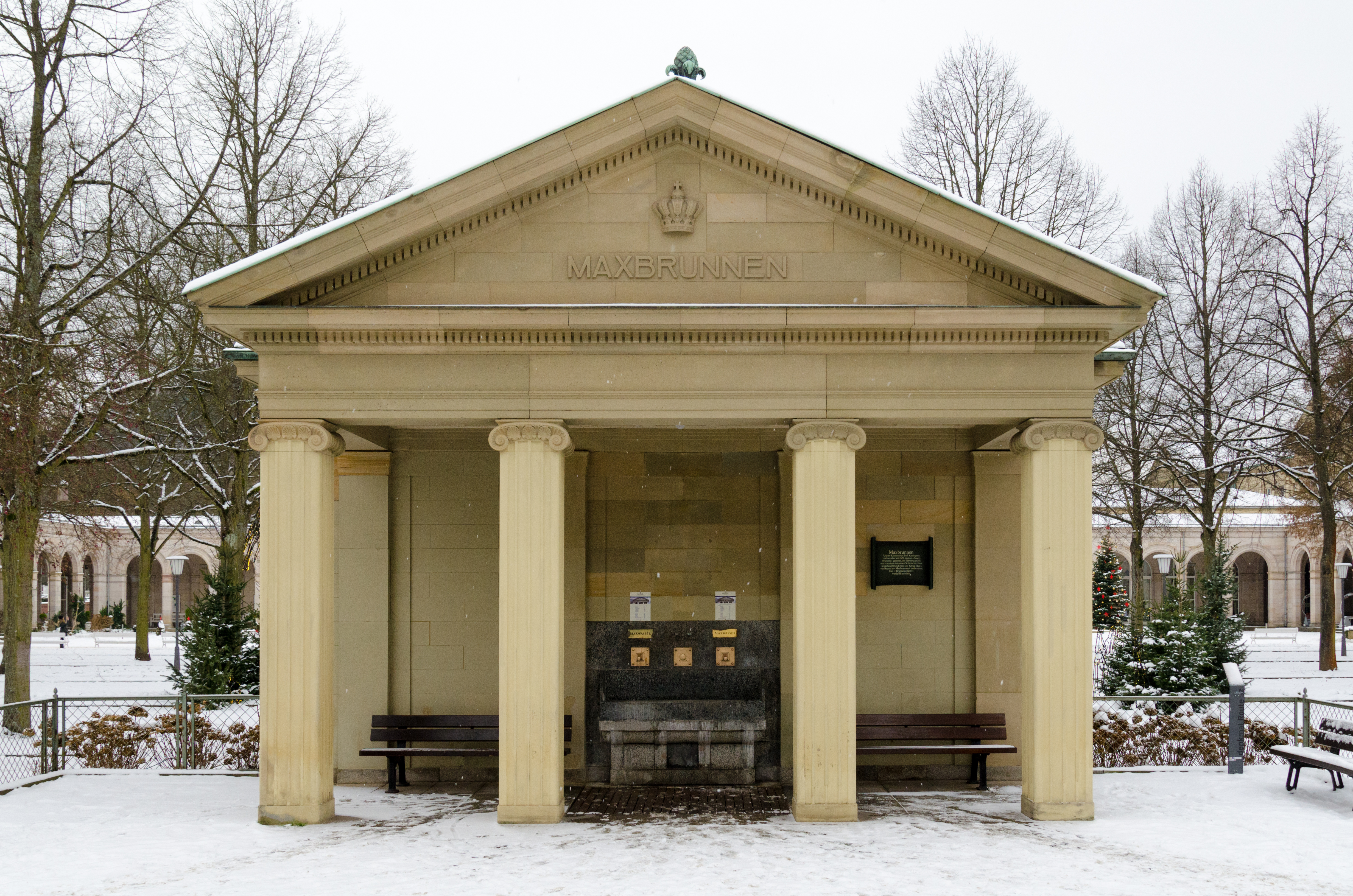 Maxbrunnen in Bad Kissingen